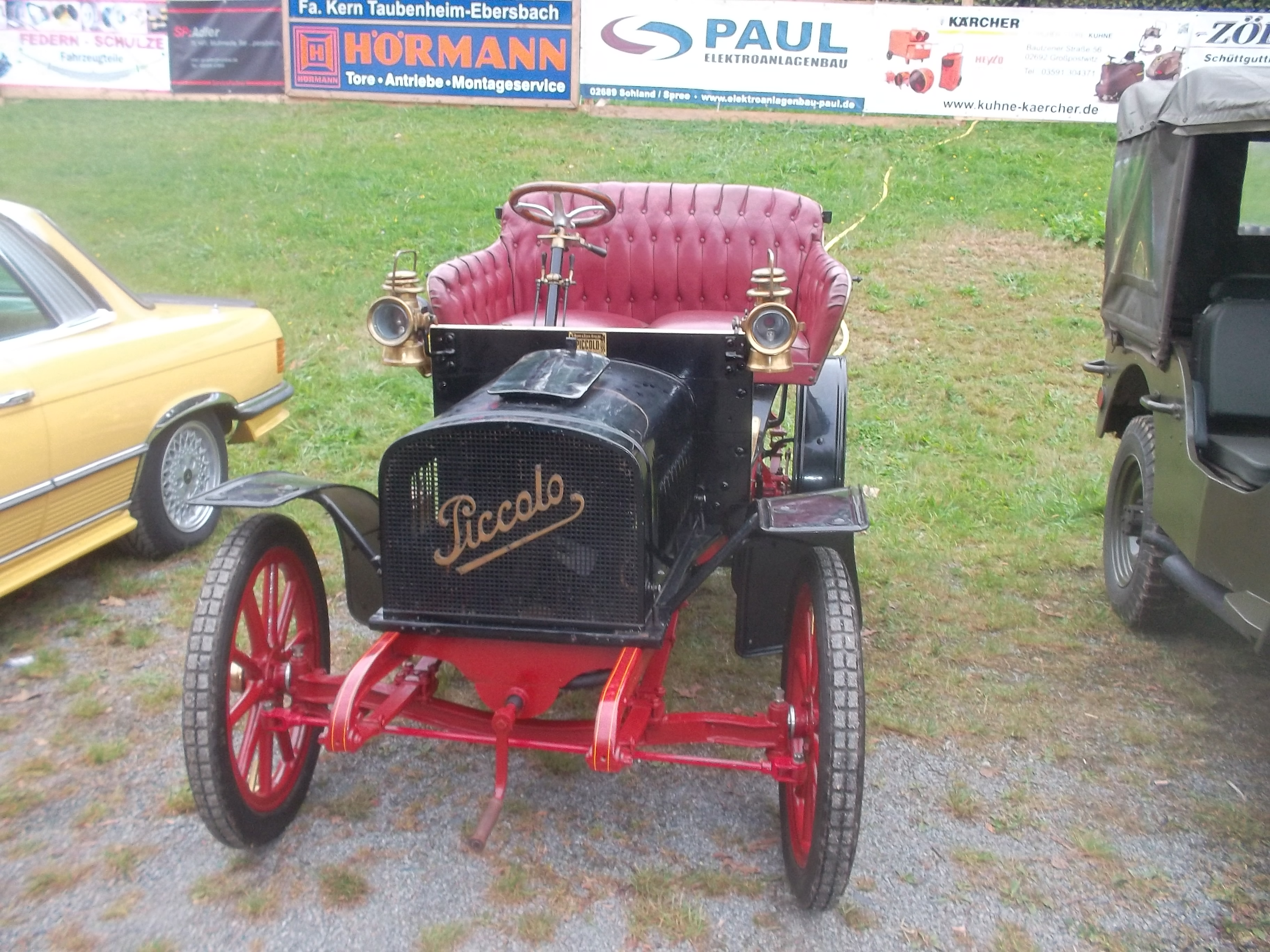 ein roter Piccolo der Apollowerke Apolda (Baujahr 1904-1910)